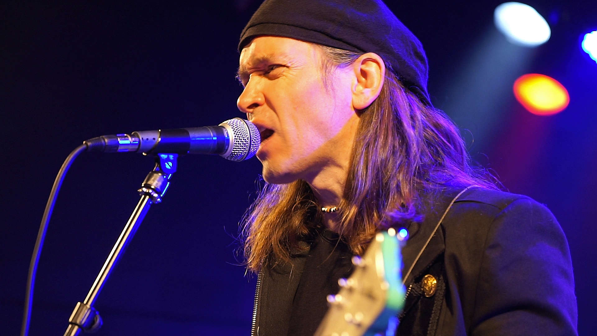 Rod Barthet photo de concert